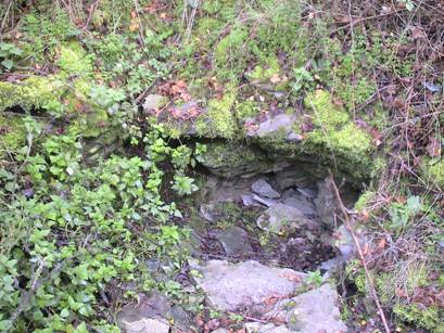 Vyústění průduchu ventaroly